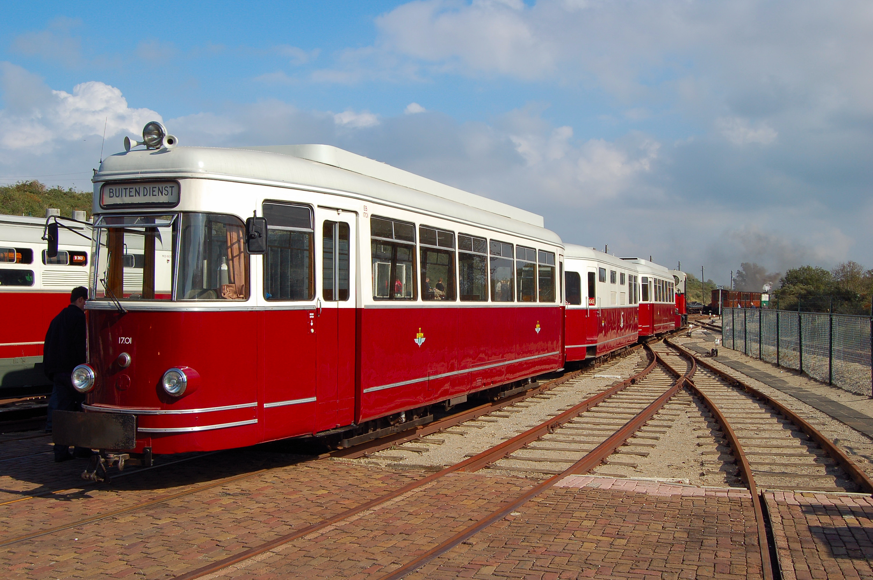 RTM 1700 Sperwer te Ouddorp ex Zillertalbahn (760 mm) ex RTM (1067 mm) ex DB Ravensburg - Baienfurt (1000 mm el.)